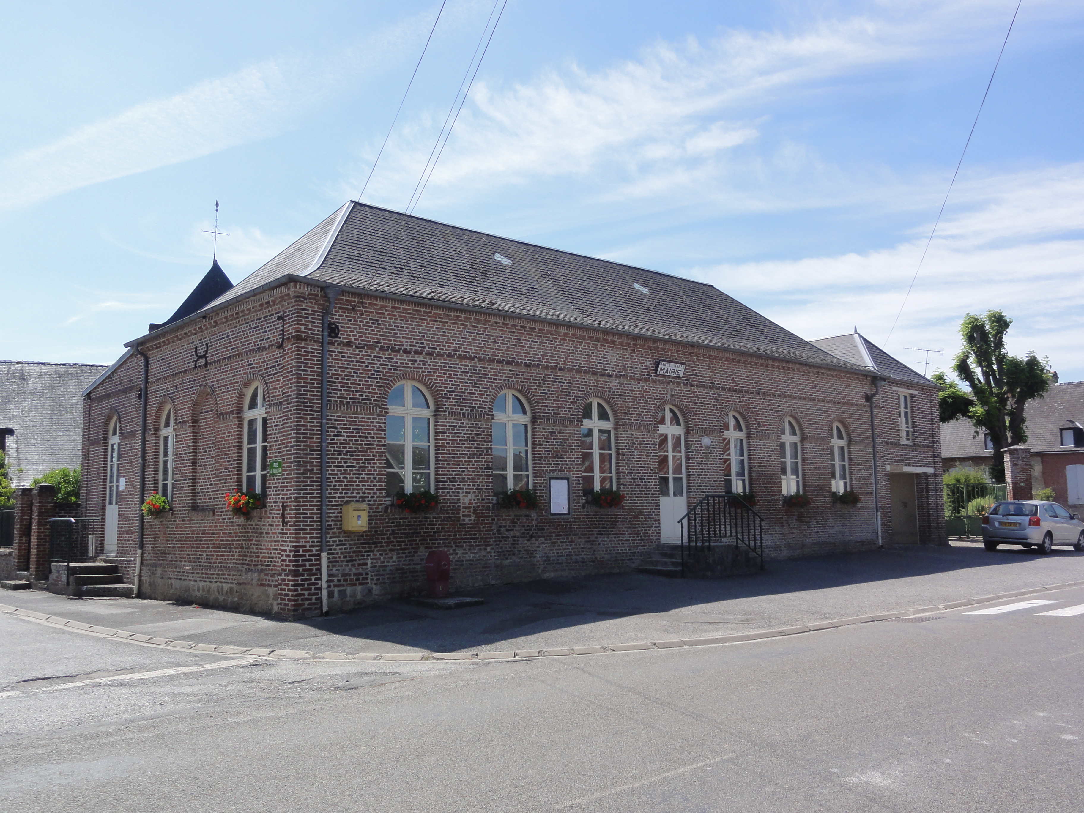 Marcy-sous-Marle (Aisne) mairie